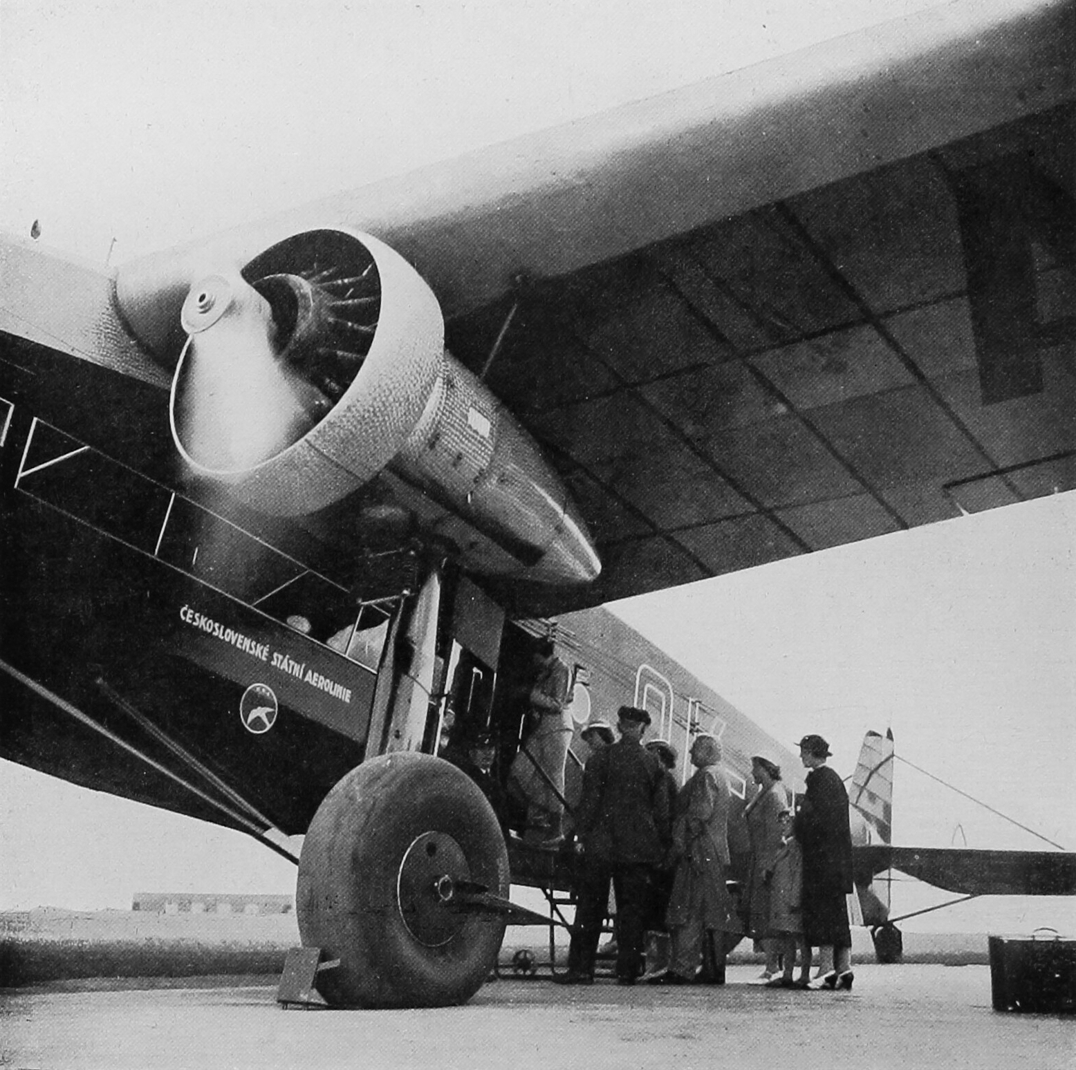 Letoun Avia F-IXD, československá licenční výroba nizozemského typu Fokker F.IX. Dvojice těchto letadel s registračními čísly OK-AFG a OK-AFF byla zařazena do flotily ČSA v létě 1935. Šlo tehdy o největší letadlo domácí konstrukce, vešlo se do něj 17 cestujících a 3 členové posádky (dvojice pilotů a radiotelegrafista). Sedadla cestujících byla v uspořádání 2+1 proti sobě. Pohon zajišťovaly 3 motory Walter Pegas II-M2 o výkonu 550 koní (celkem tedy 1650 koní).